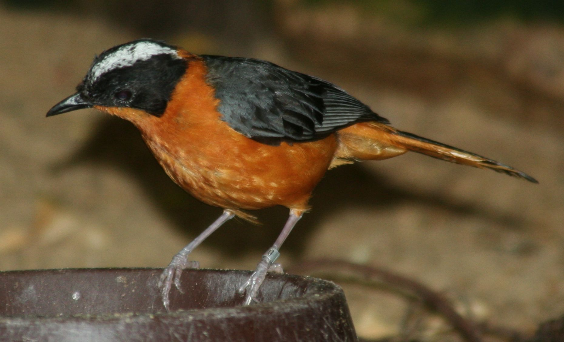 Cossypha niveicapilla, Vogelpark Walsrode